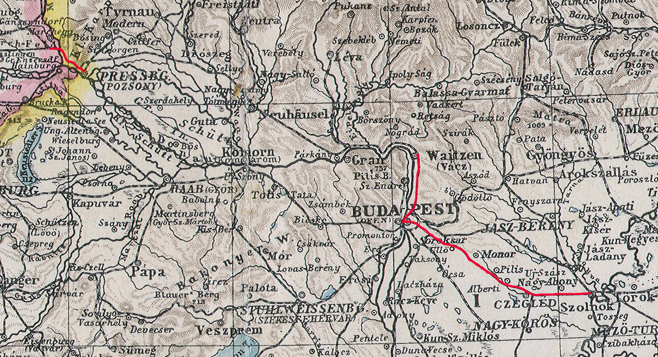 A Magyar középponti Vasút vonalai